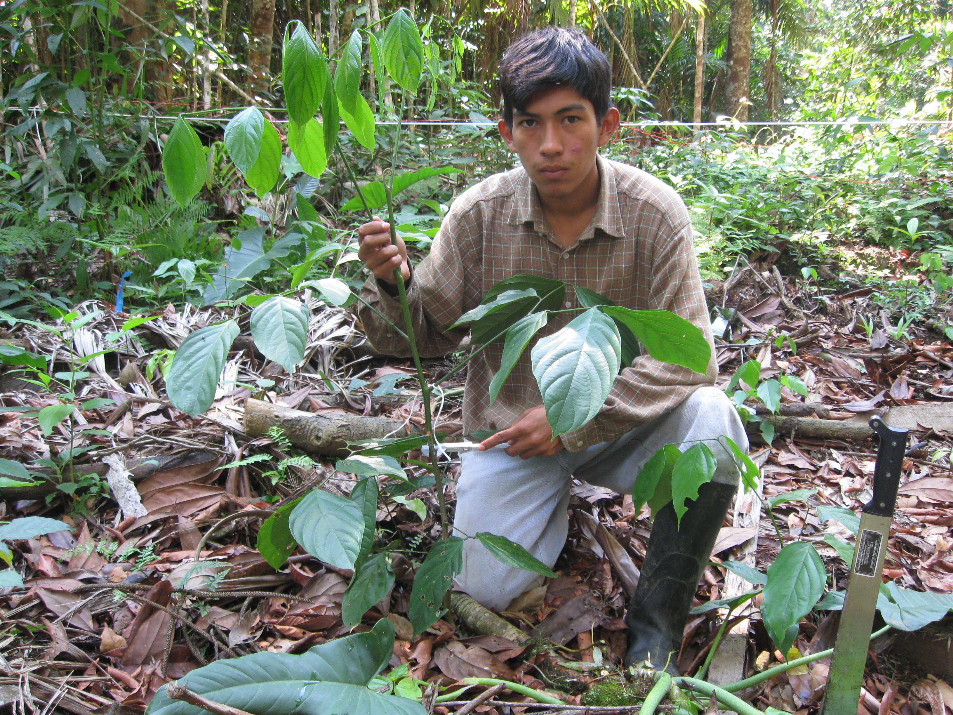 Foto tomada a una planta de regeneracion natural de Cedrelinga catenaeformis Ducke (Tornillo) en el área de la CC.NN. Catungo Quimpiri - Rio Tambo - VRAE - Perú